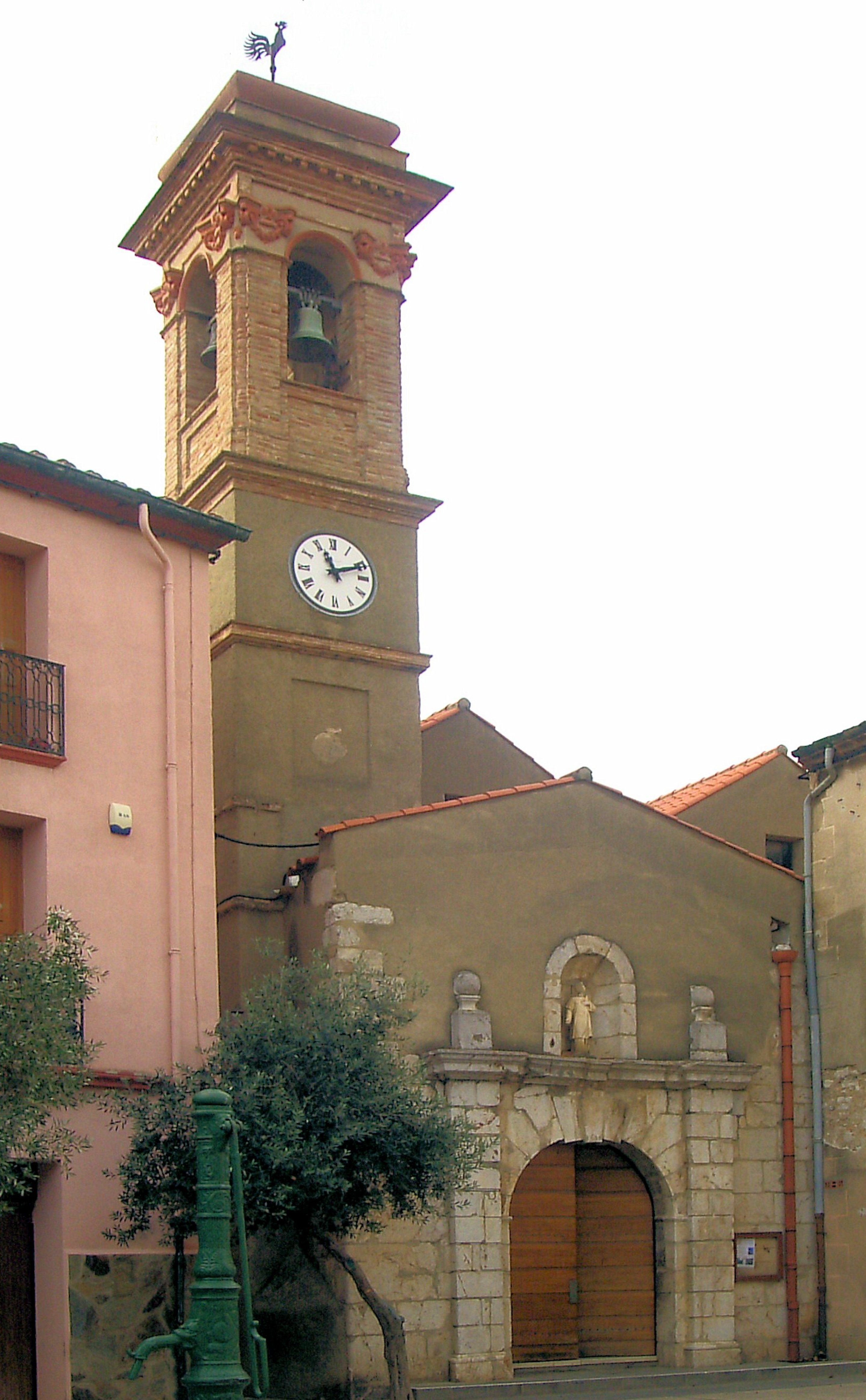 L'église Saint-Étienne à Salses-le-ChâteauBarrou